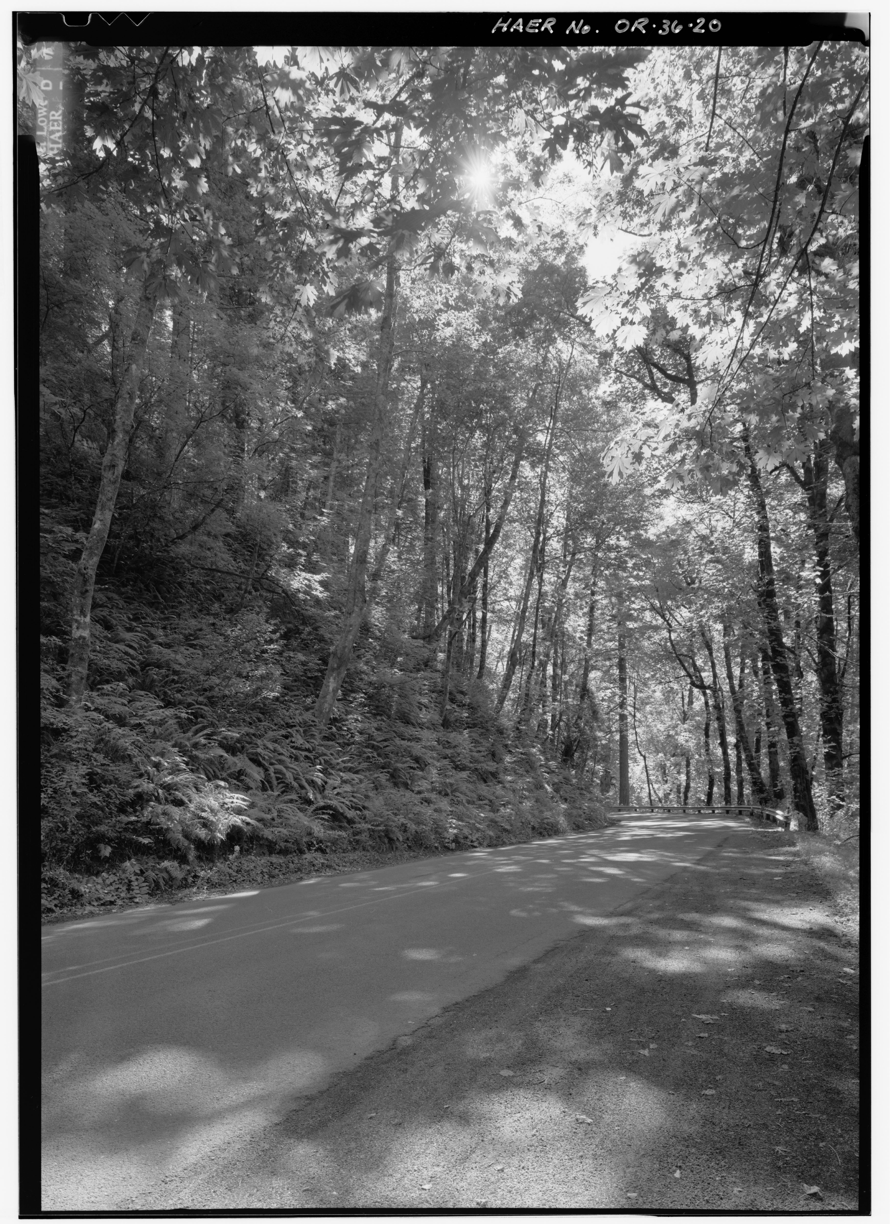 LANDSCAPE VIEW OF FIGURE EIGHT LOOPS LOOKING WEST.